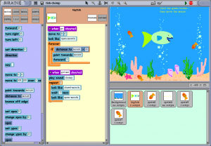 Попередні версії Скретчу